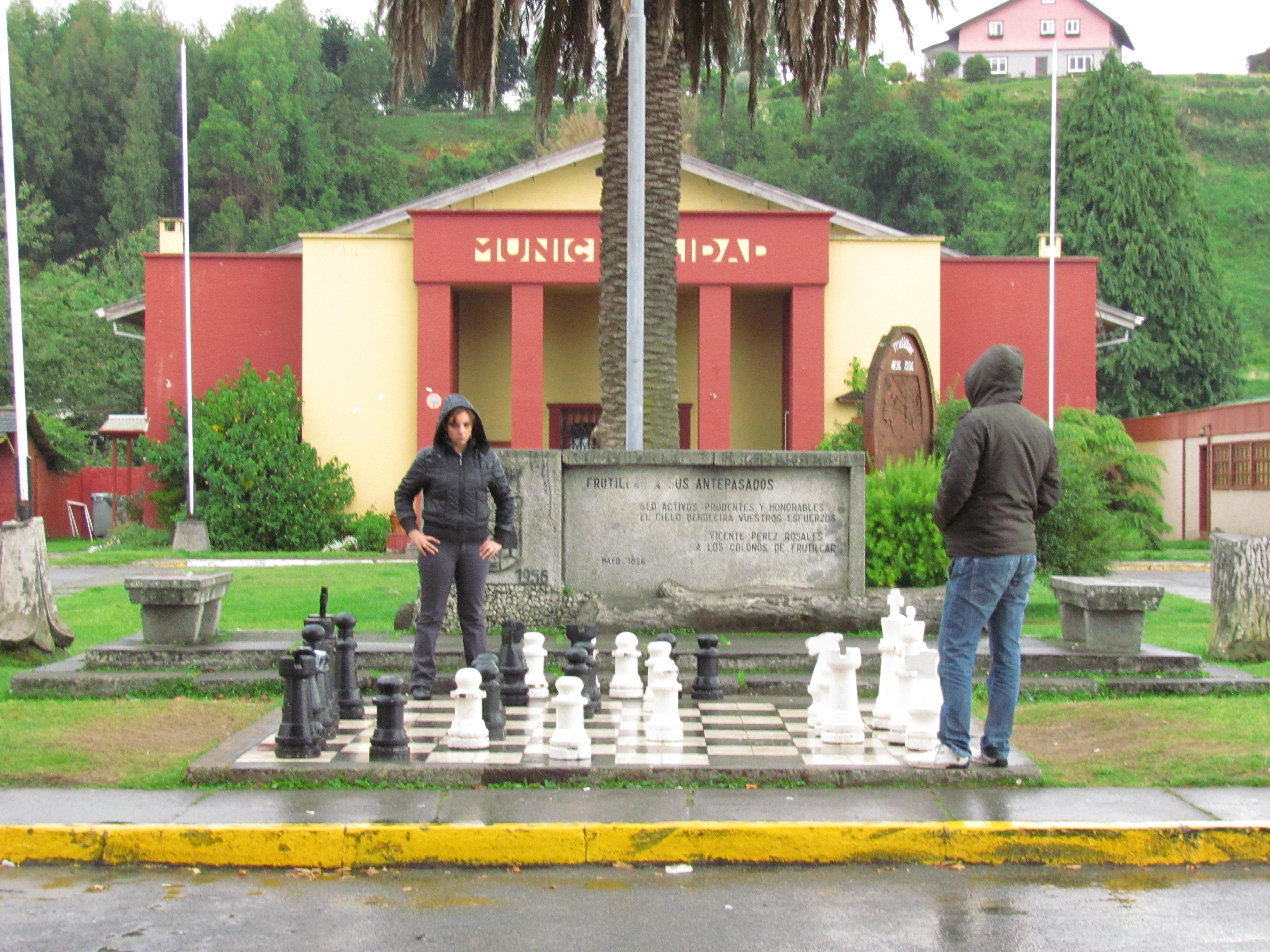 Ajedrez frente a la Municipalidad de Frutillar, Chile. En el bloque a los colonos alemanes, se dice: "Frutillar a sus antepasados / Sed prudentes, activos y honorables / El cielo bendicirá vuestros esfuerzos / Vicente Pérez Rosales / A los colonos de Frutillar / Mayo 1856". A la izquierda, el escudo con dos fechas en los extremos inferiores: 1856 (izq., no se ve en la foto) y 1956.